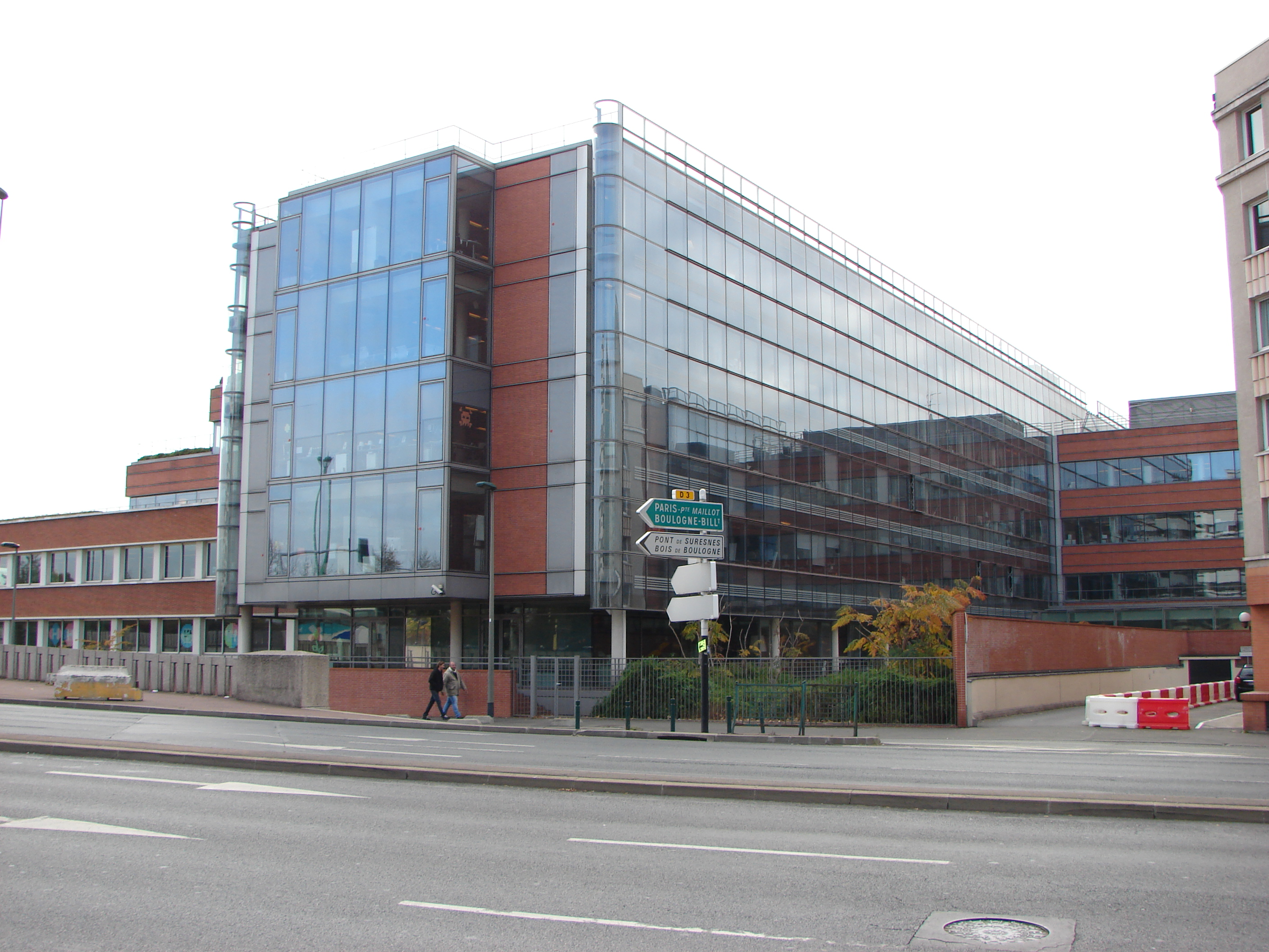 Siège social du Groupe Havas vu de sa façade nord (ancienne parfumerie Coty, puis Usine Agfa Gevaert) situé au 11-13, bd Henri Sellier à Suresnes